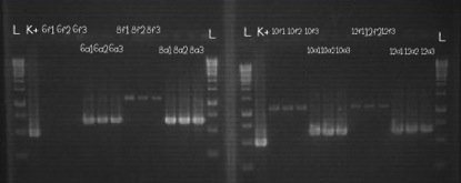 Visualisasi hasil sintesis cDNA untai pertama